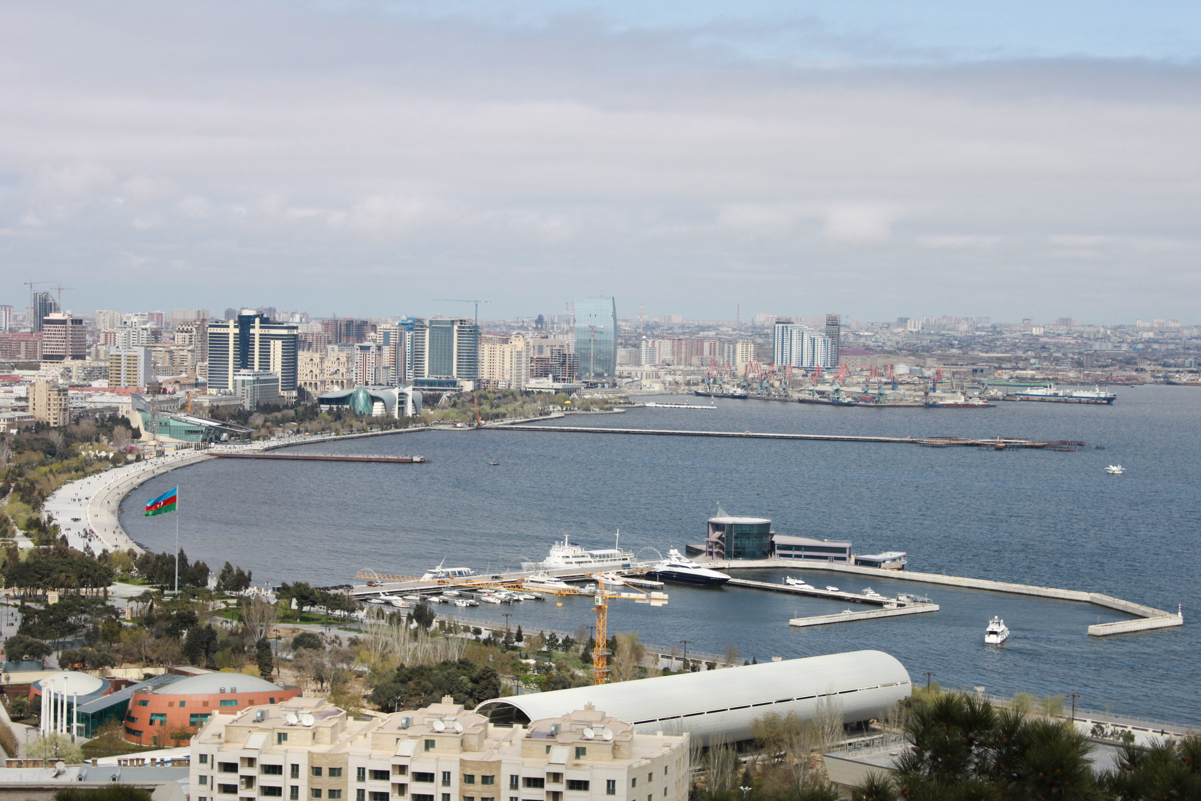 Баку. Великолепный вид. Набережная. Бульвар. Порт.